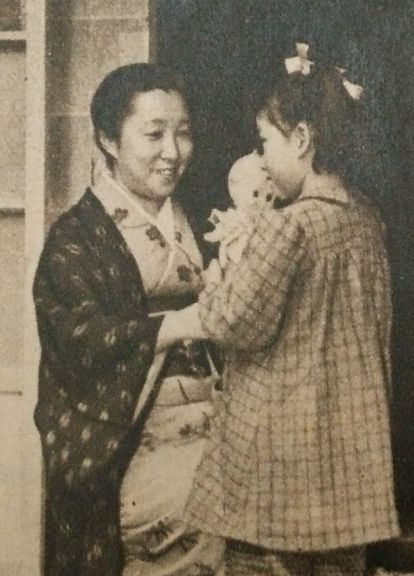 小林正子（小説『縮図』のモデル）